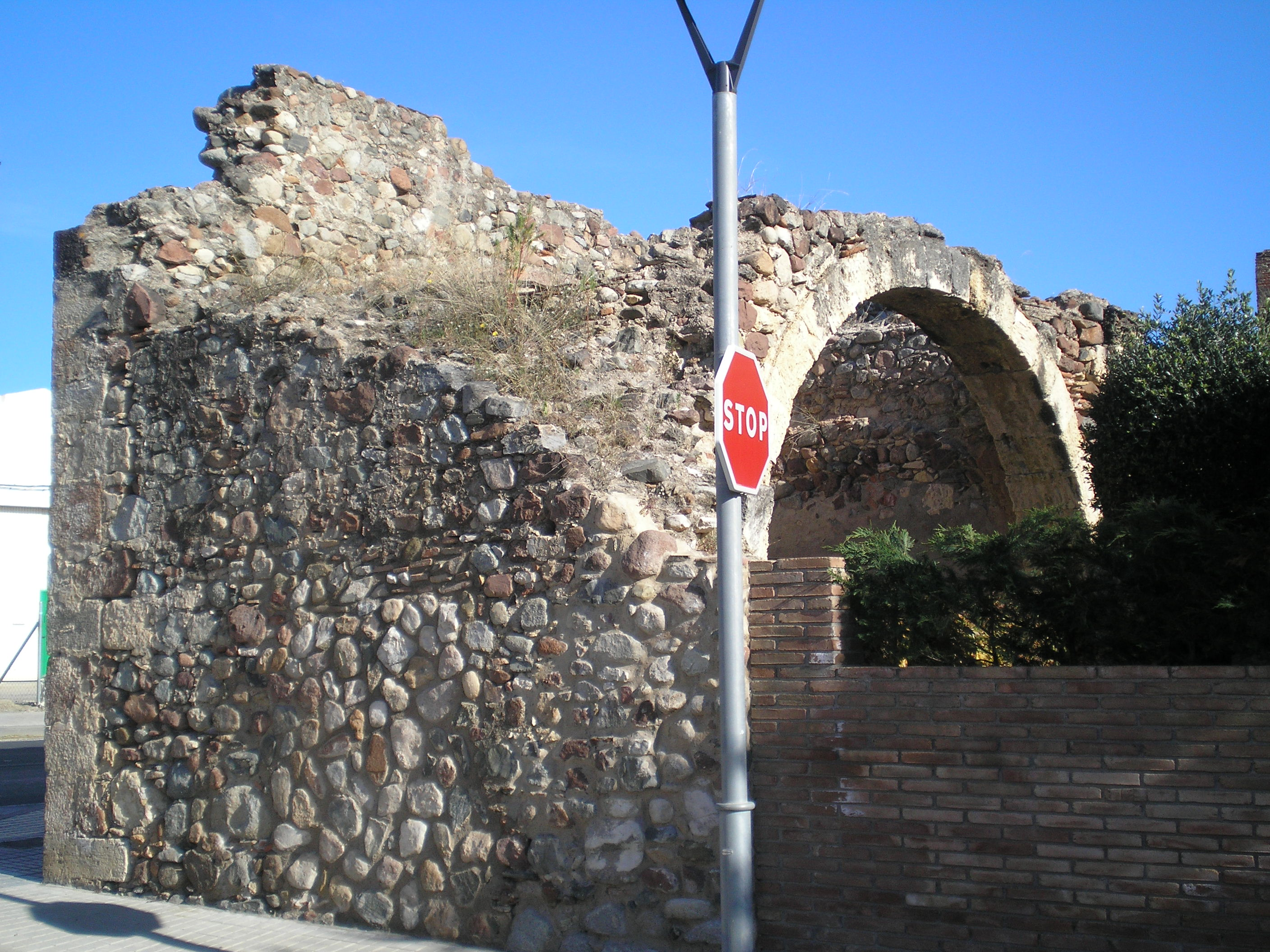 Ruïnes del convent de Sant Joan dels Franciscans a Riudoms